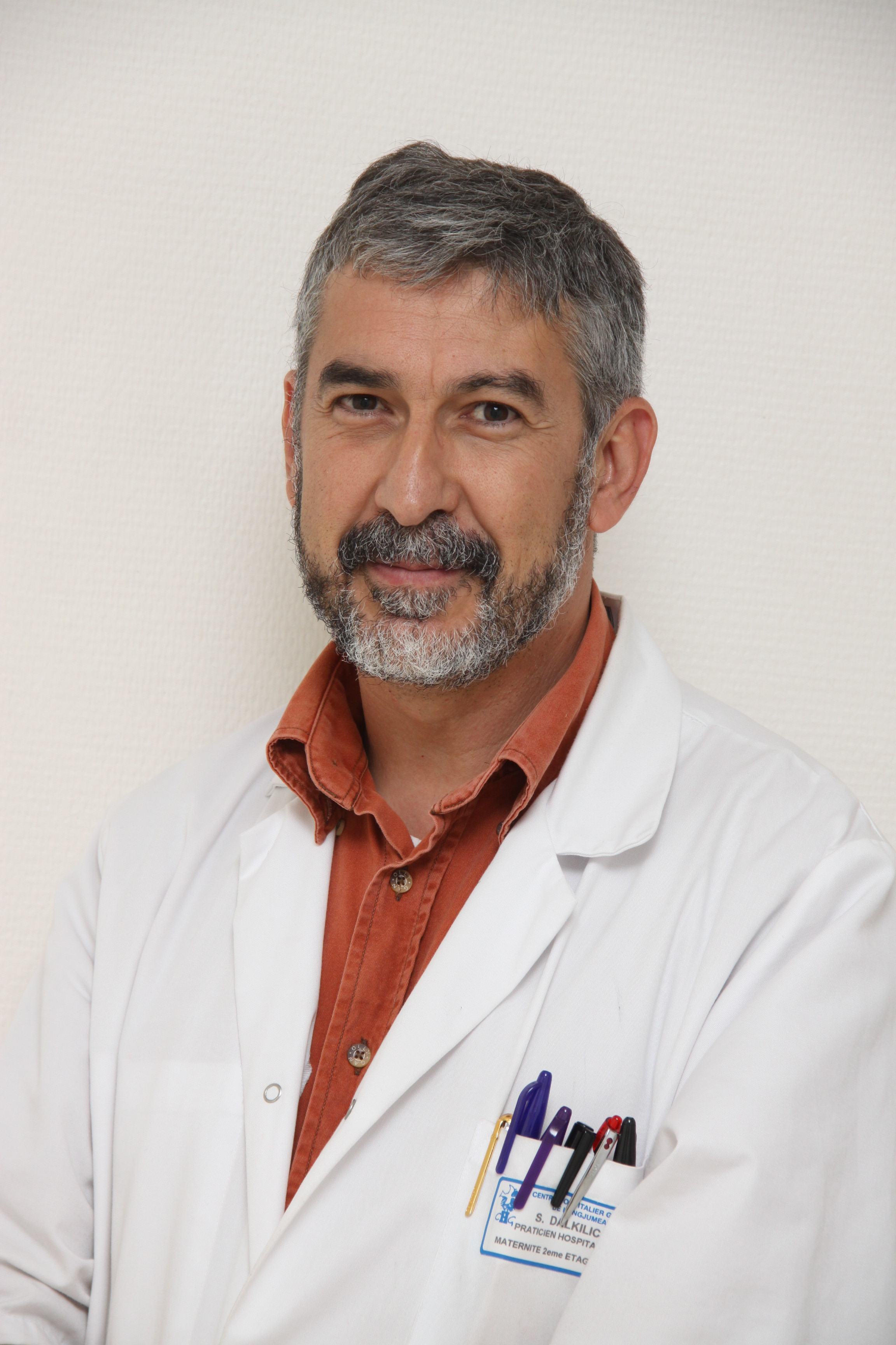 Dr Serdar DALKILIC Gynécologue-Obstétricien